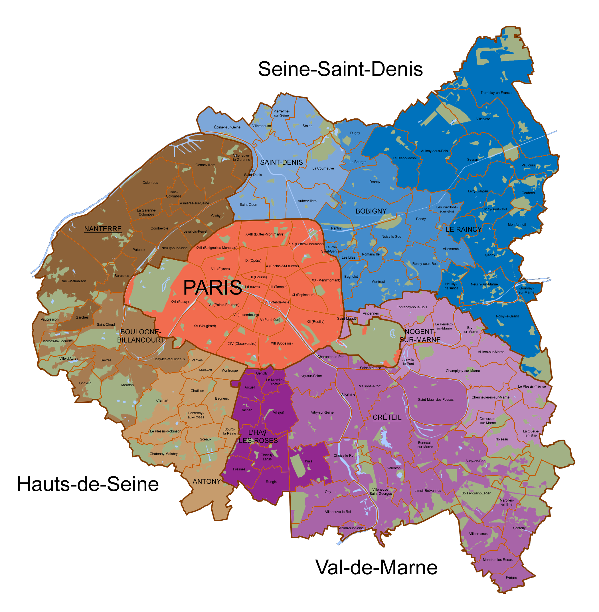 Comunas de la 'Petite Couronne' (Pequeña Corona) de París. Los colores corresponden a los departamentos y las sombras de color a los distritos ('arrondissements').